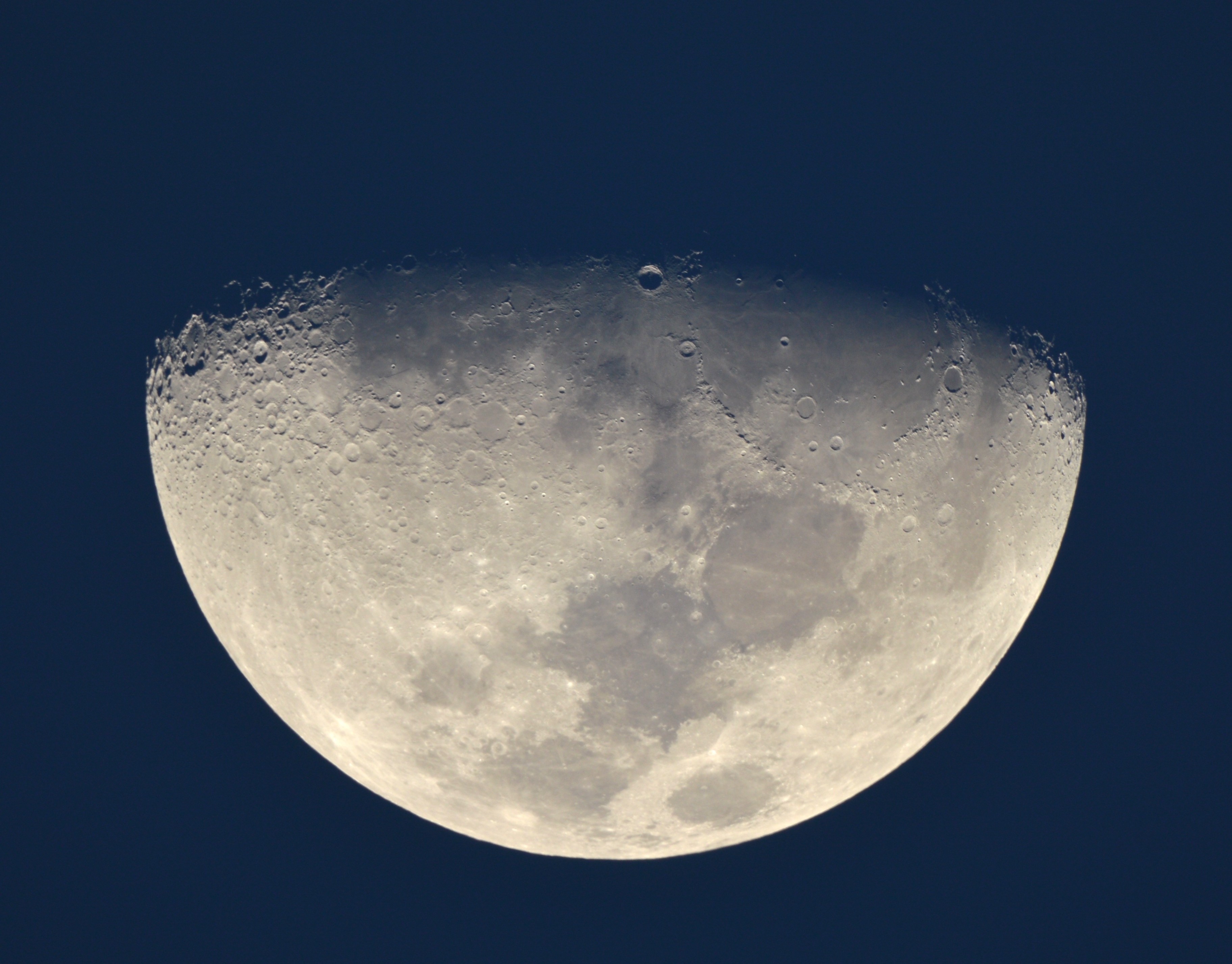 Luna en cuarto creciente observada a través del telescopio